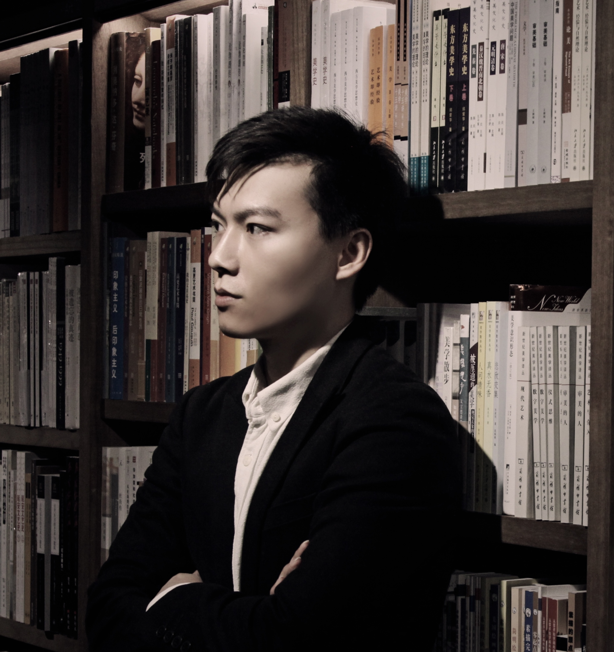 文言: 陈楸帆2015